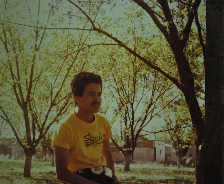 Jason Guadalupe. Nogaleras 1978